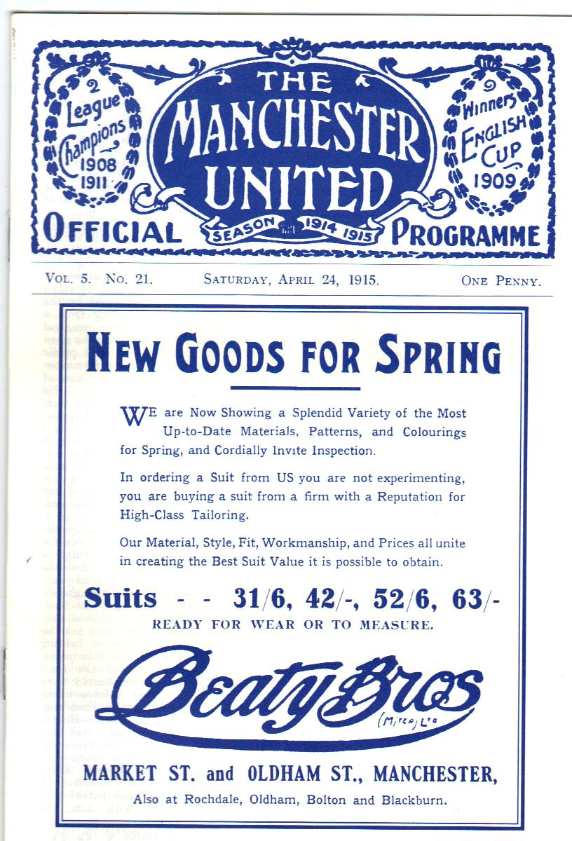 Титульный лист программы матча «Финал Кубка Англии по футболу 1915»